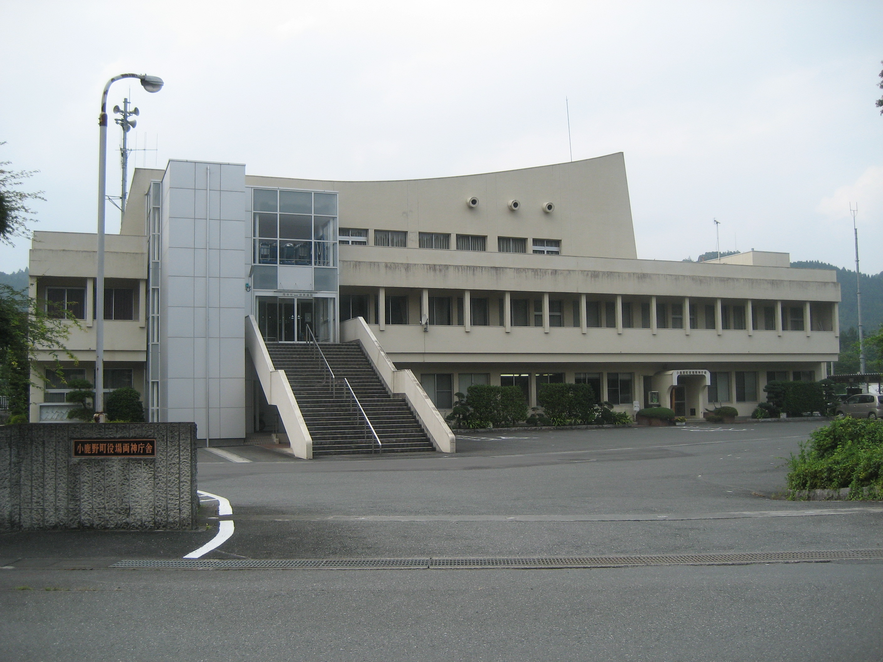 埼玉県小鹿野町役場両神庁舎